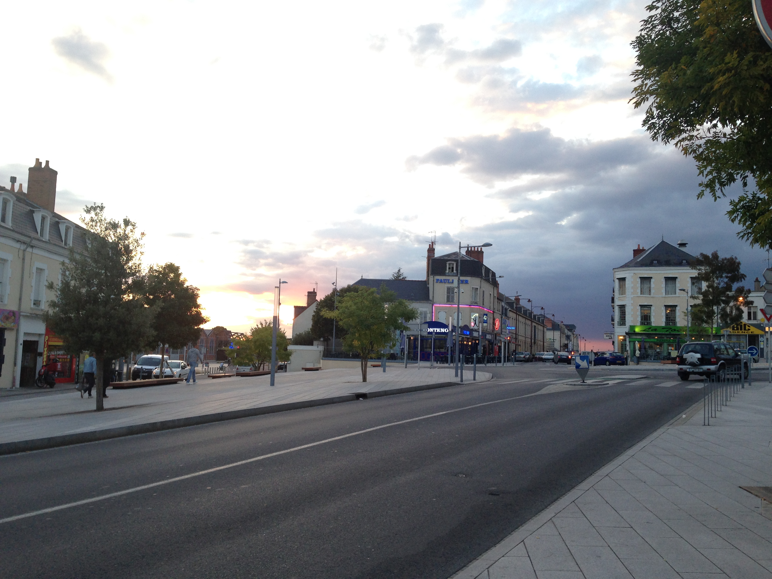 au bord de la rue à Vierzon